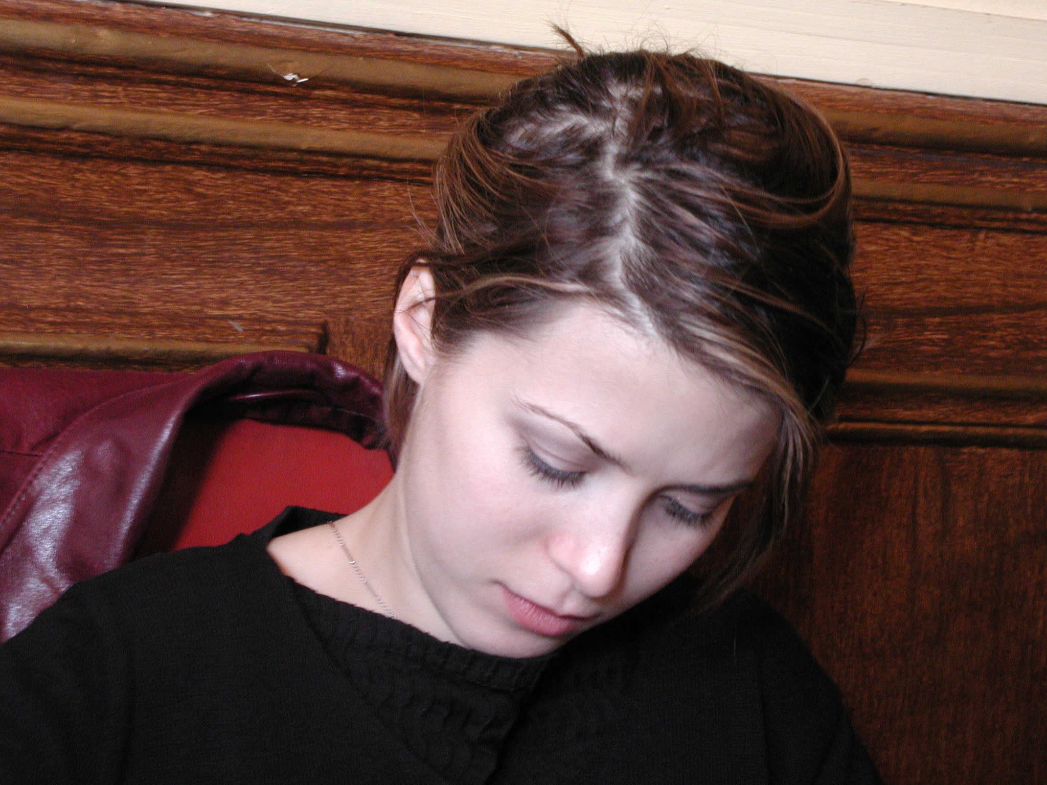 « Tristane » Banon (2002). À cette époque, elle n'était ni blonde, ni connue.